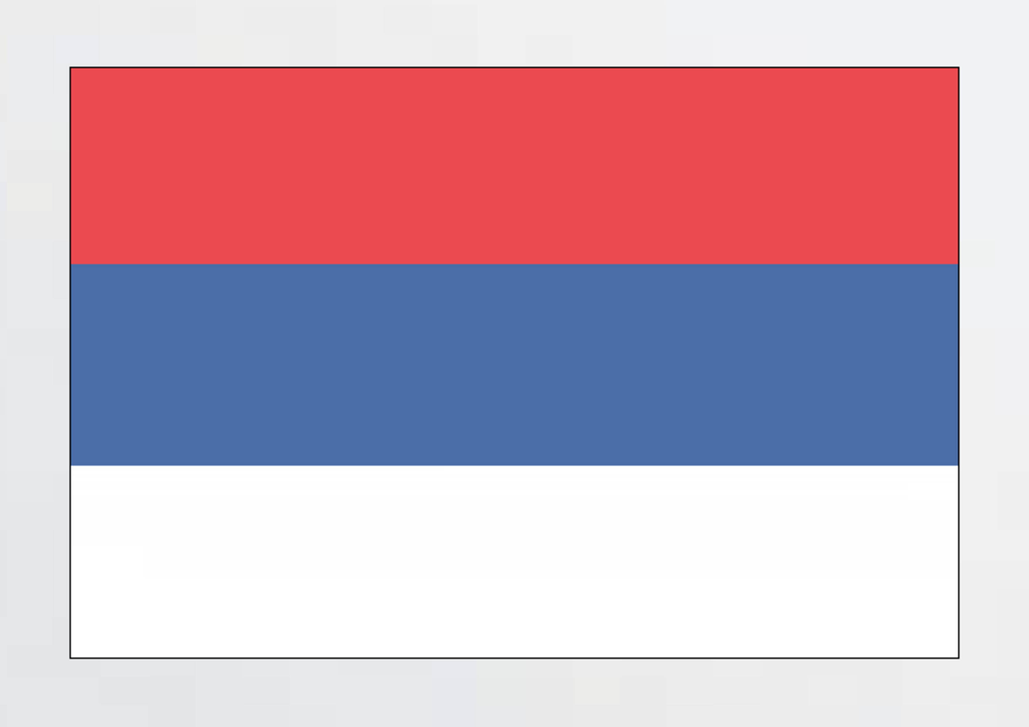 Narodna zastava Republike Srbije za uramljivanje A4 format.Napomena: Za advokatske kancelarije, ugostiteljske objekte, turistička mesta, trgovinske objekte itd.